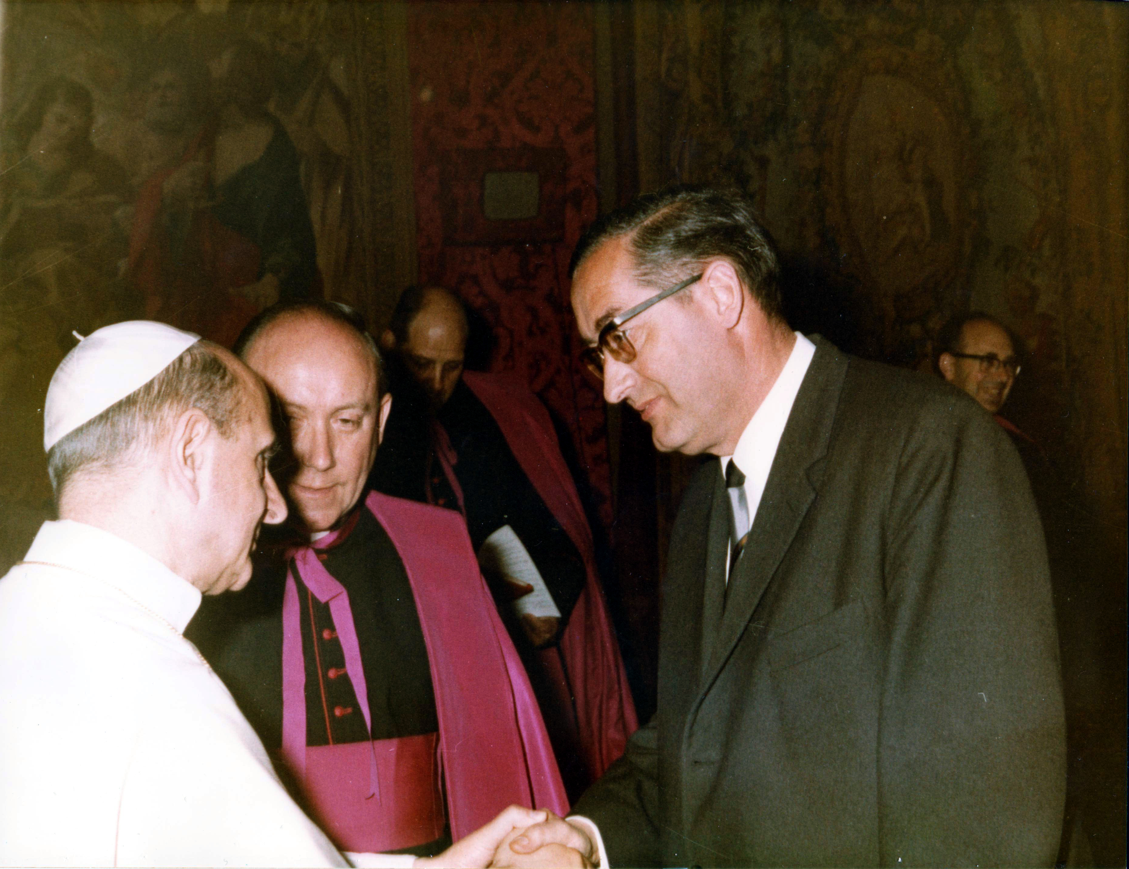 Kurt Aland: Audienz bei Papst Paul VI.